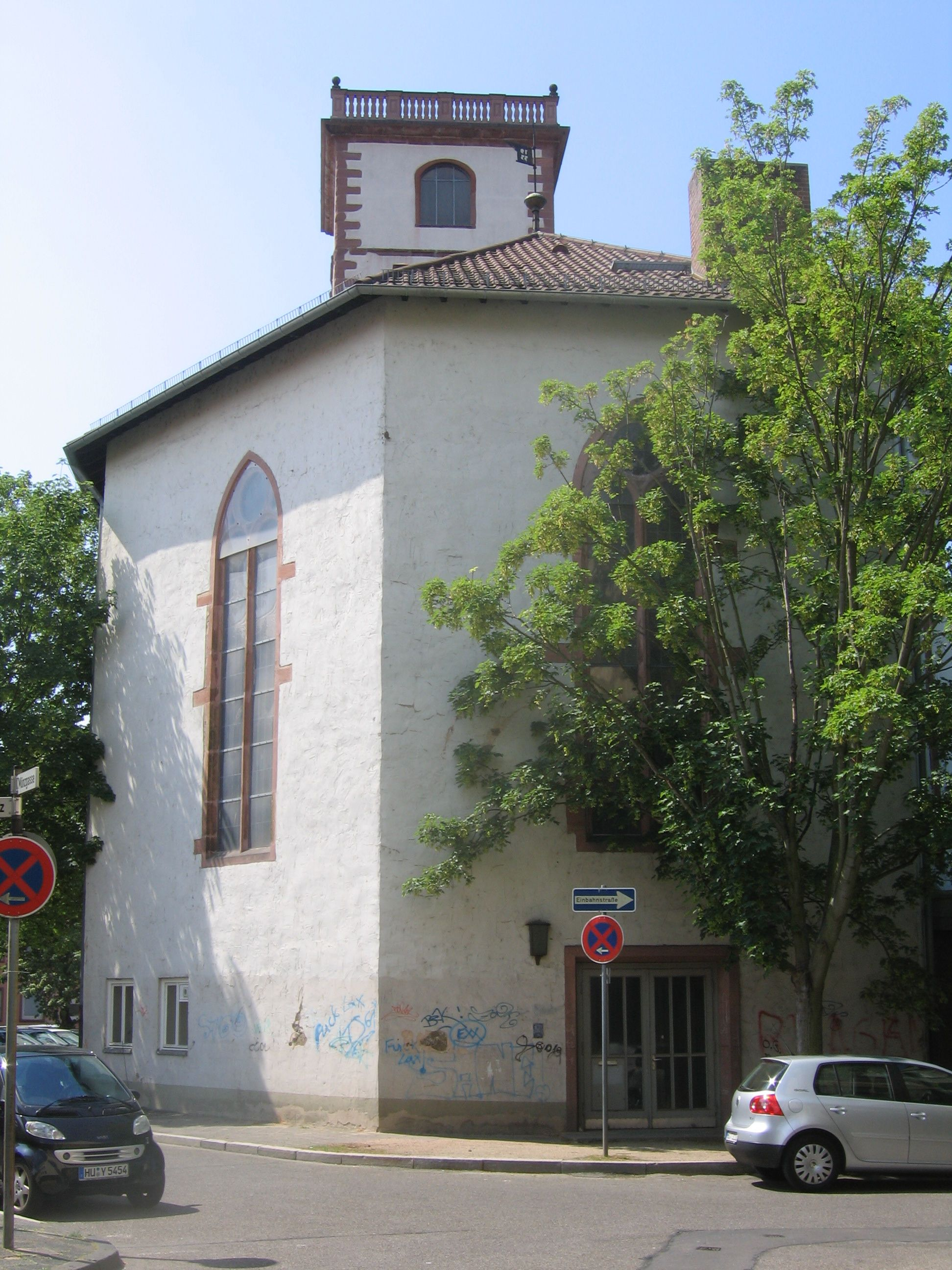 Alte Johanneskirche (Hanau) Nordseite, Johanneskirchplatz